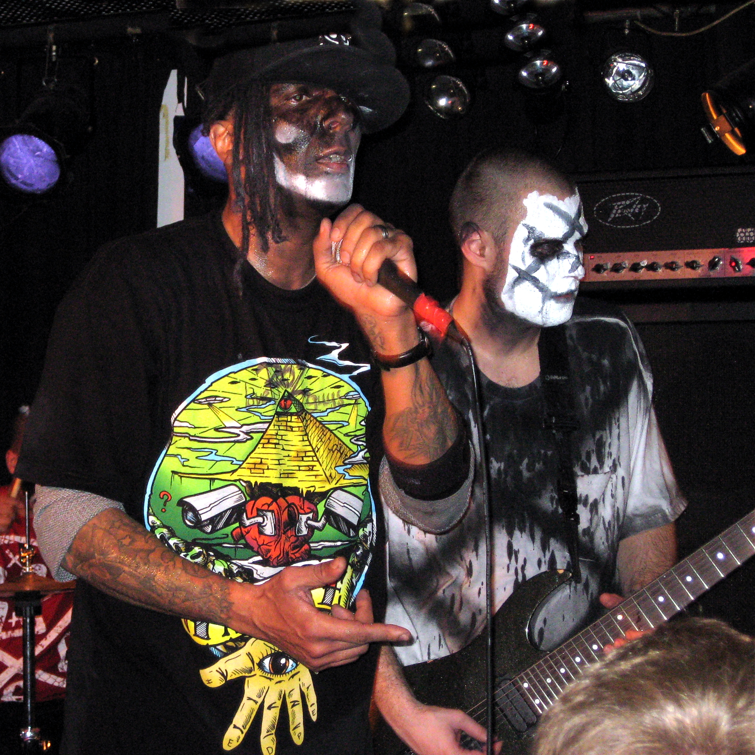 M.C.U.D. und Jaxon von (hed)p.e. live @ Nachtleben, Frankfurt/Main